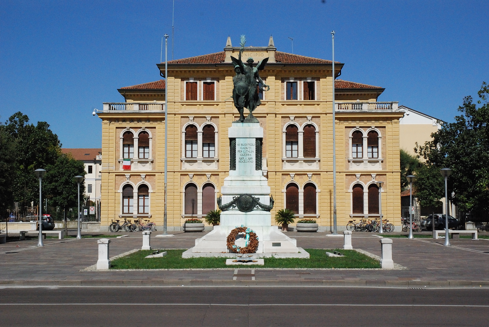 Monumento ai caduti e municipio di Mogliano Veneto.